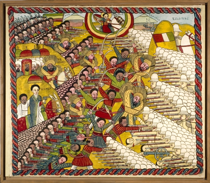 De betekenis van de Amhaarse teksten, van links naar rechts en van boven naar beneden: 1) Sint Joris 2) De kerkelijke drie-eenheid 3) Sint Joris kerk in Adua 4) Generaal Baratieri 5) Keizer Menelik 6) Keizerin Taytu